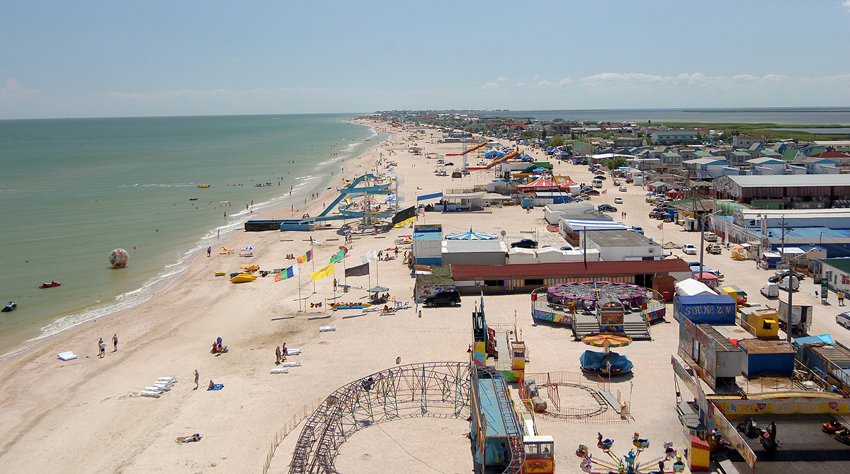 июнь 2009